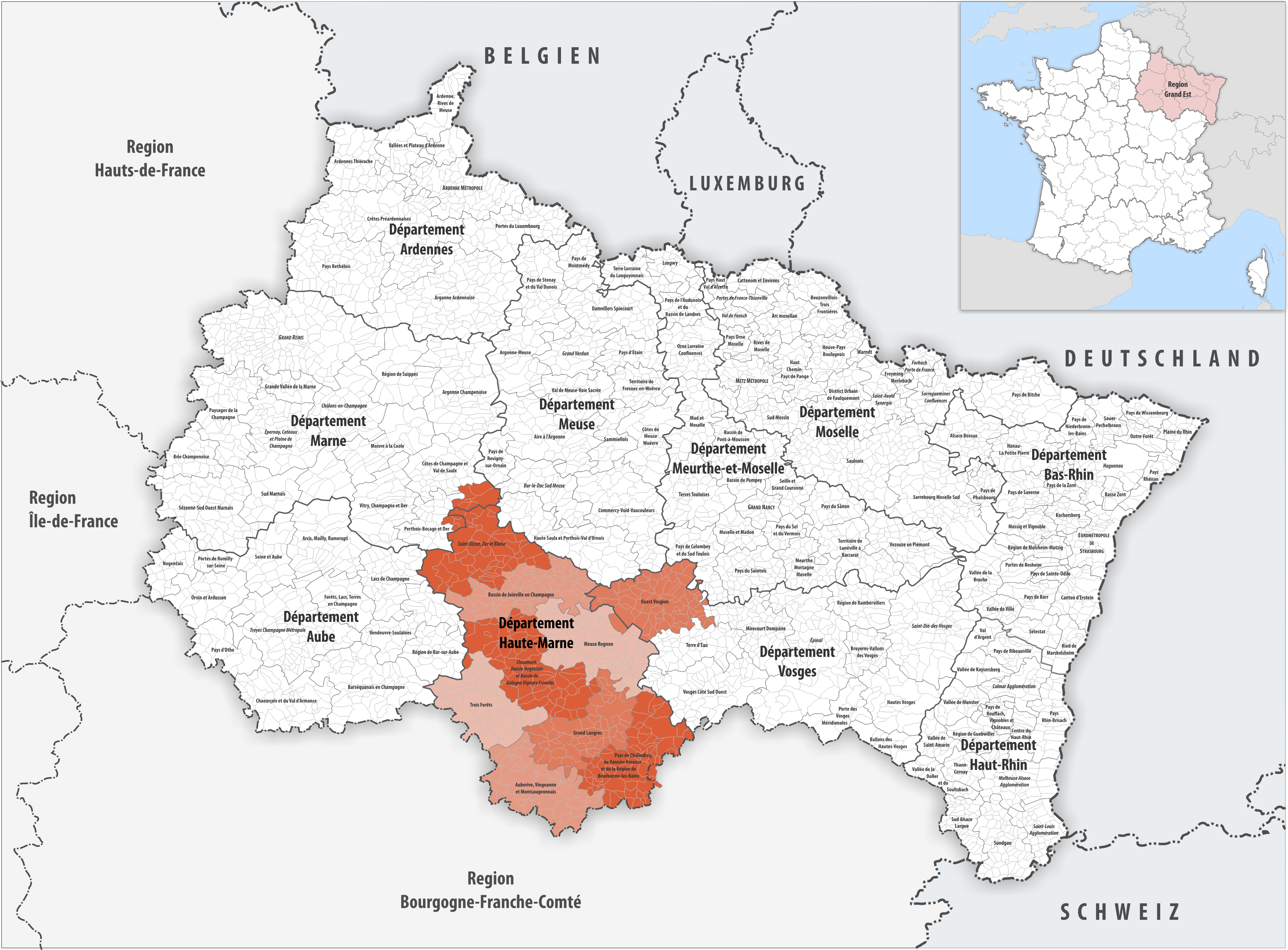 Gemeindeverbände im Département Haute-Marne